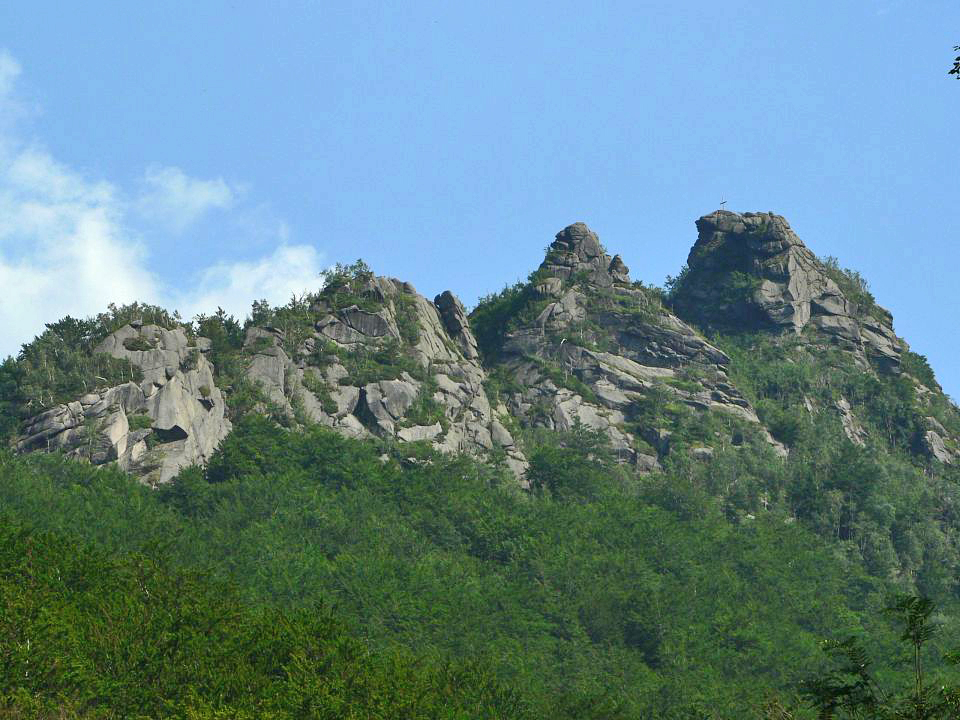 Frýdlantské cimbuří, Jizera Mountains